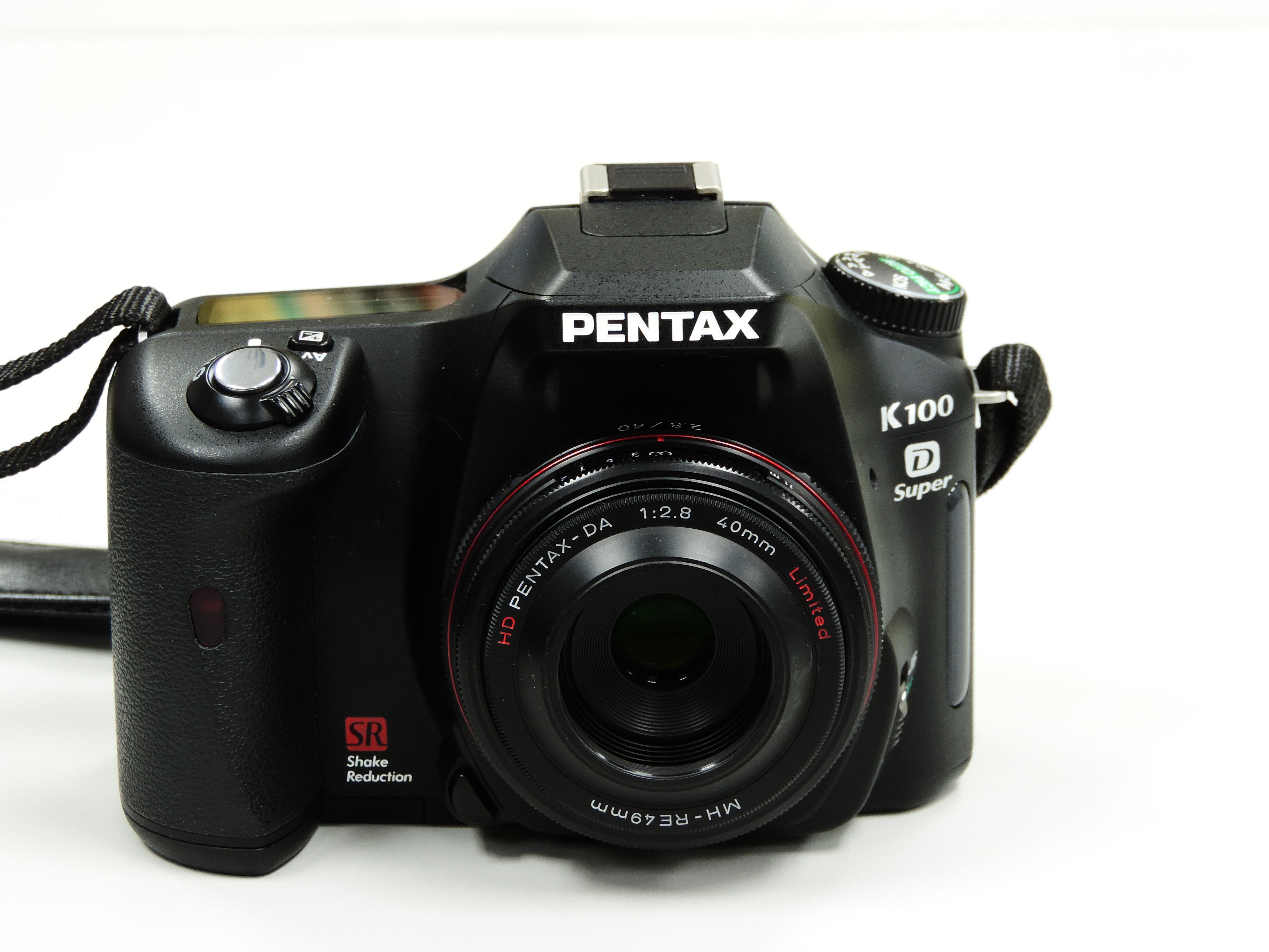 PENTAX K100D super with HD DA 40mm F2.8 Limited